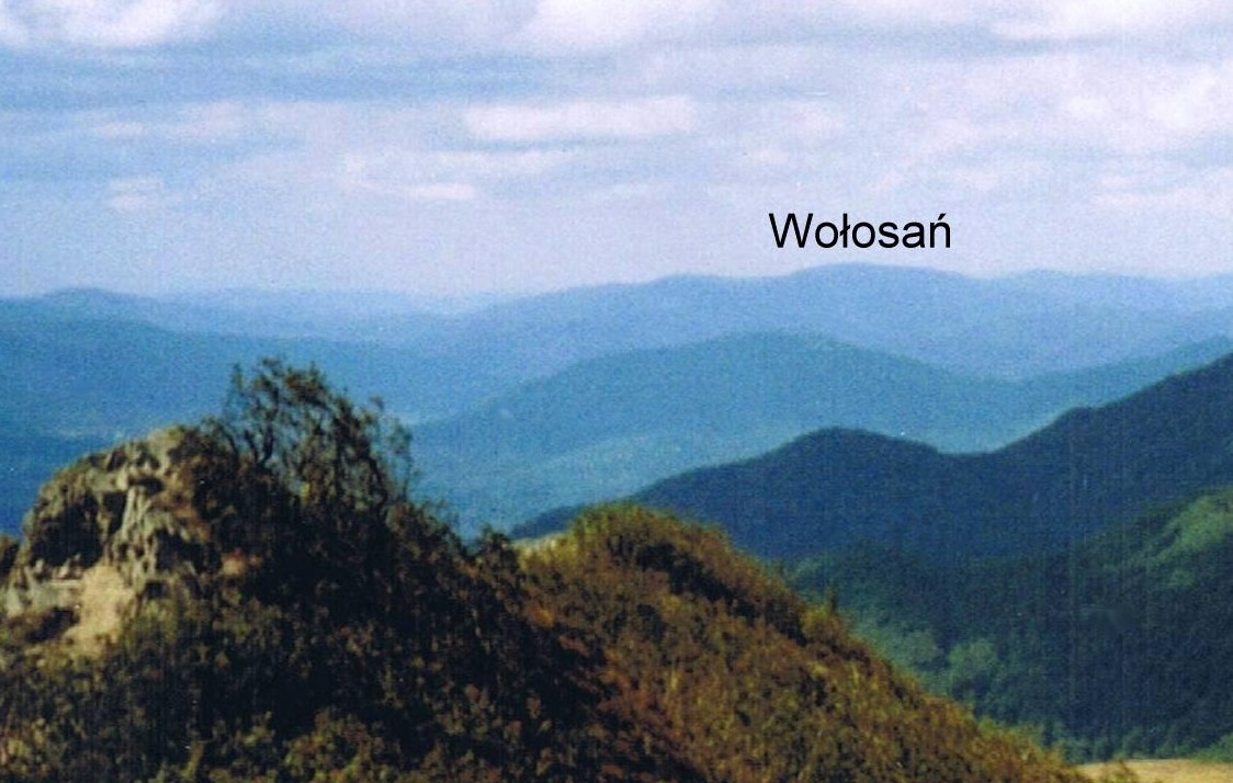 Wołosań from Osadzki Wierch. Wołosań z Osadzkiego Wierchu.